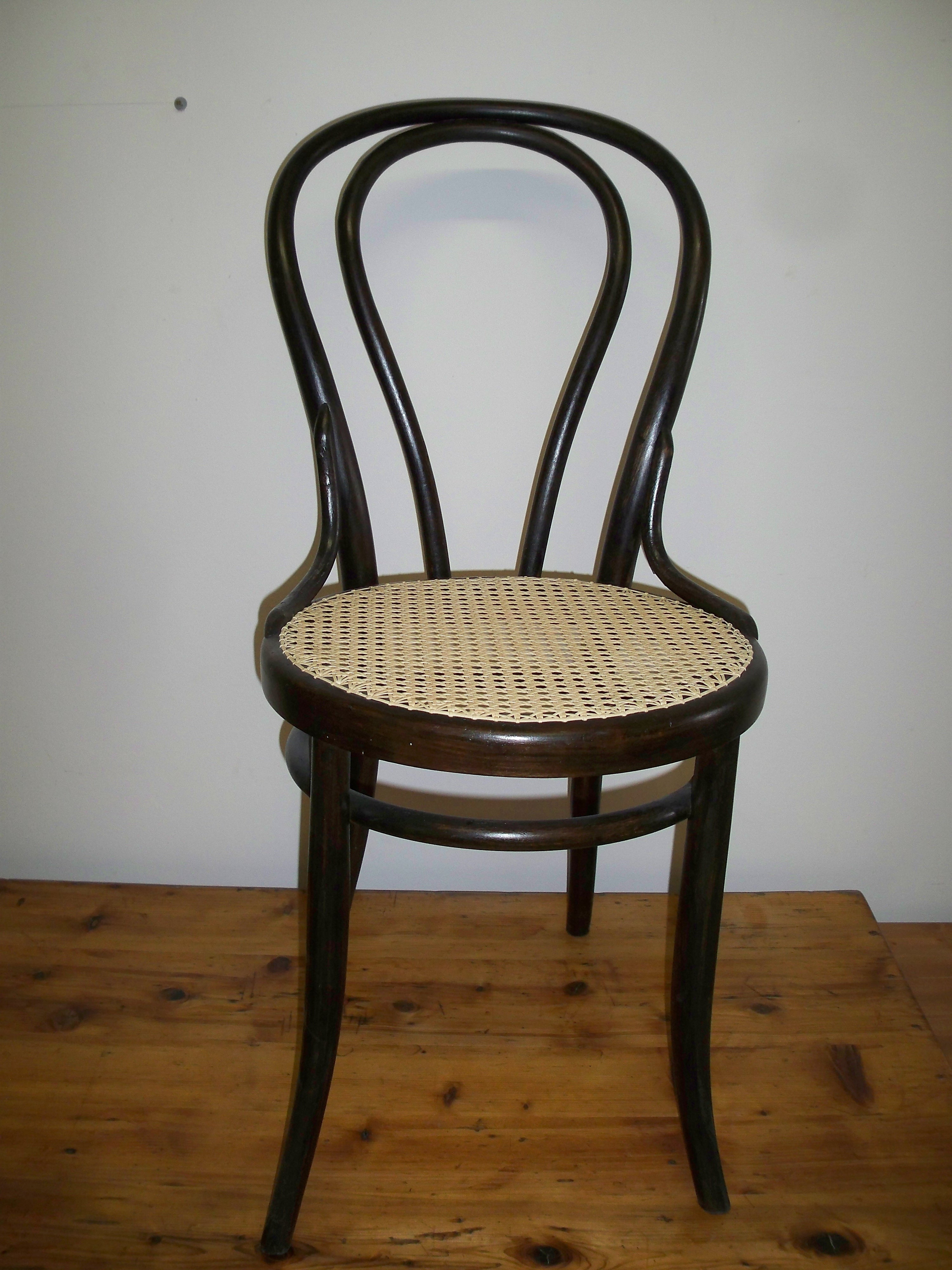 krzeslo nr 14